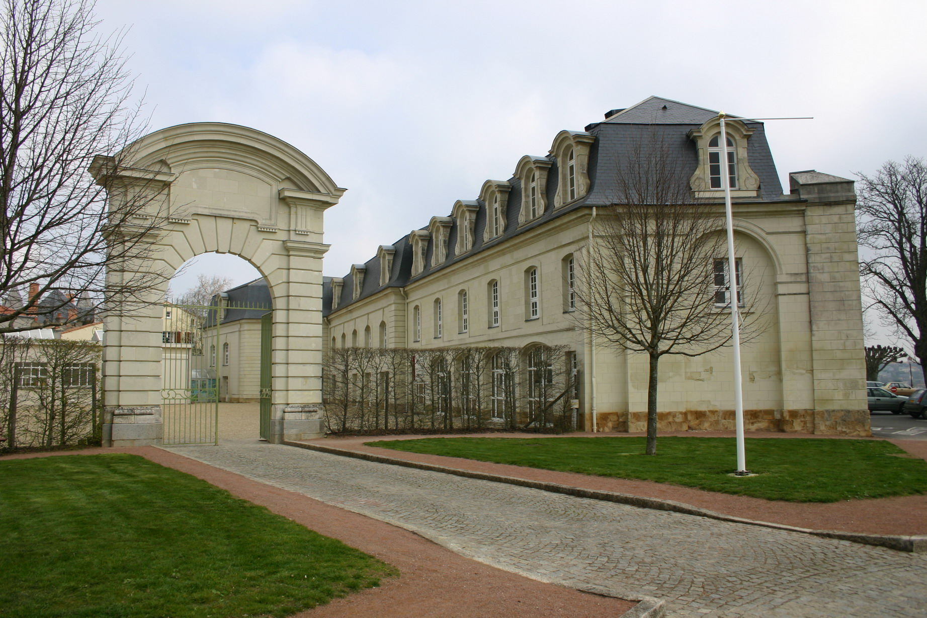 Ecuries du chateau de Thouars (79) située à proximitées